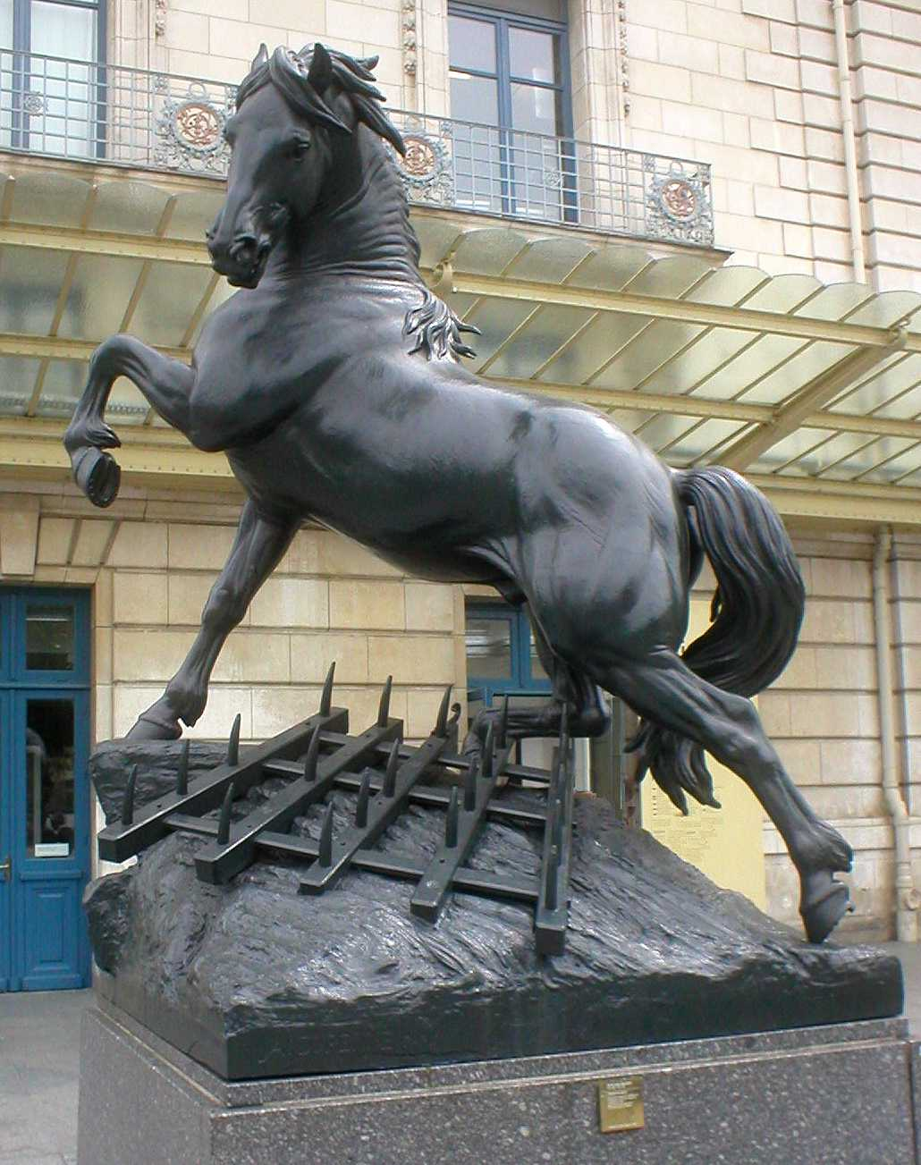 Pierre Louis Rouillard, Cheval à la herse, 1878, fonte de fer, Paris, parvis du musée d'Orsay.